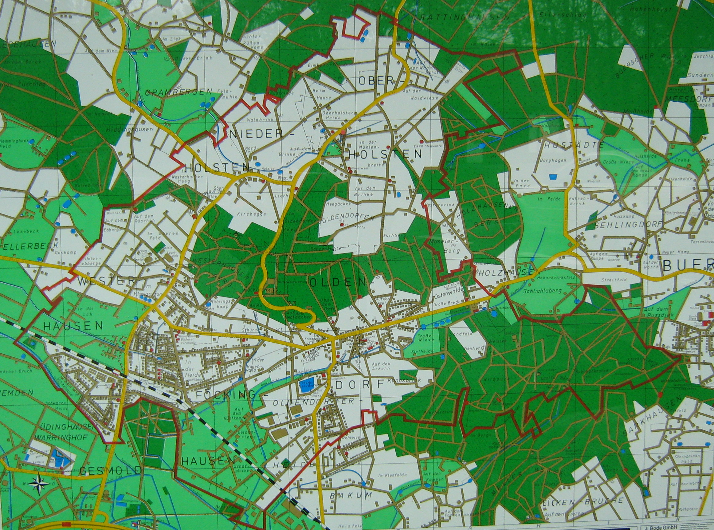 Stadtteilplan von Olendorf (Melle)